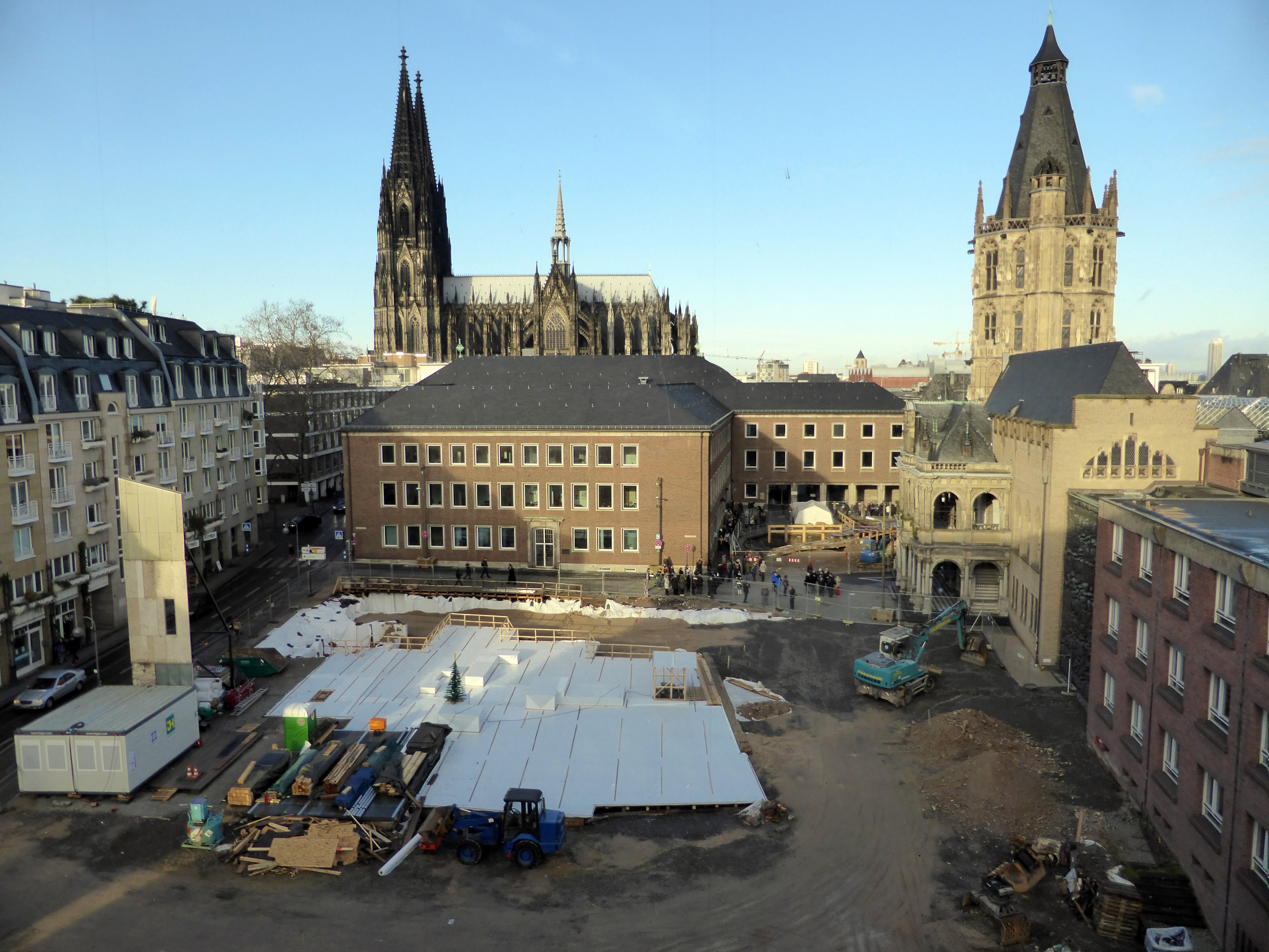 Die Grabungszone - Archäologische Zone Köln im Januar 2015 mit Weihnachtsbaum